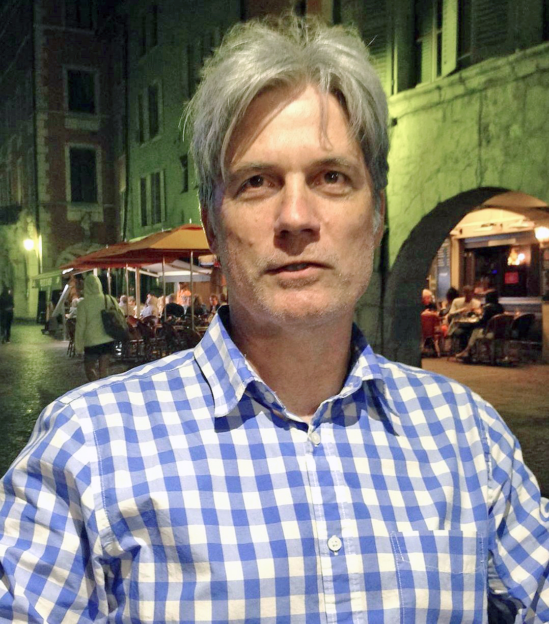 Cordell Barker au Festival international du film d'animation d'Annecy 2015